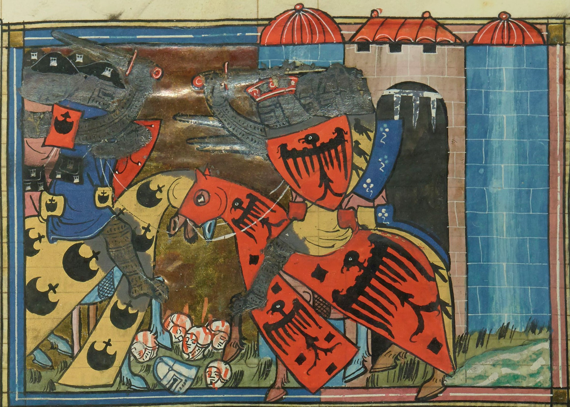 Bataille de Konstantinopol (1097)